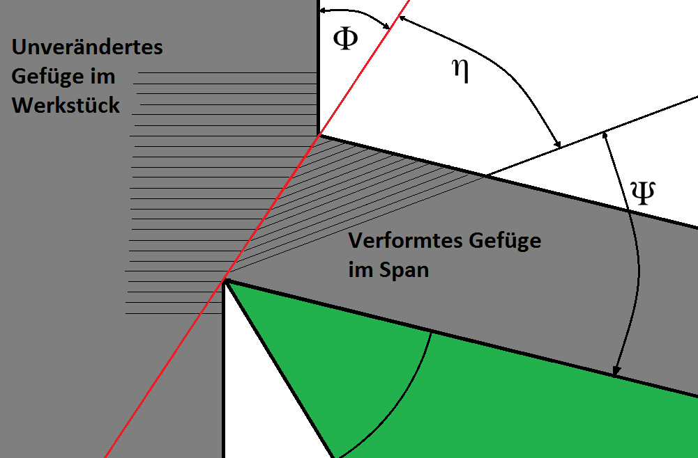 Spanbildung im Scherebenenmodell Scherwinkel Phi, Strukturwinkel eta, Fließwinkel Psi